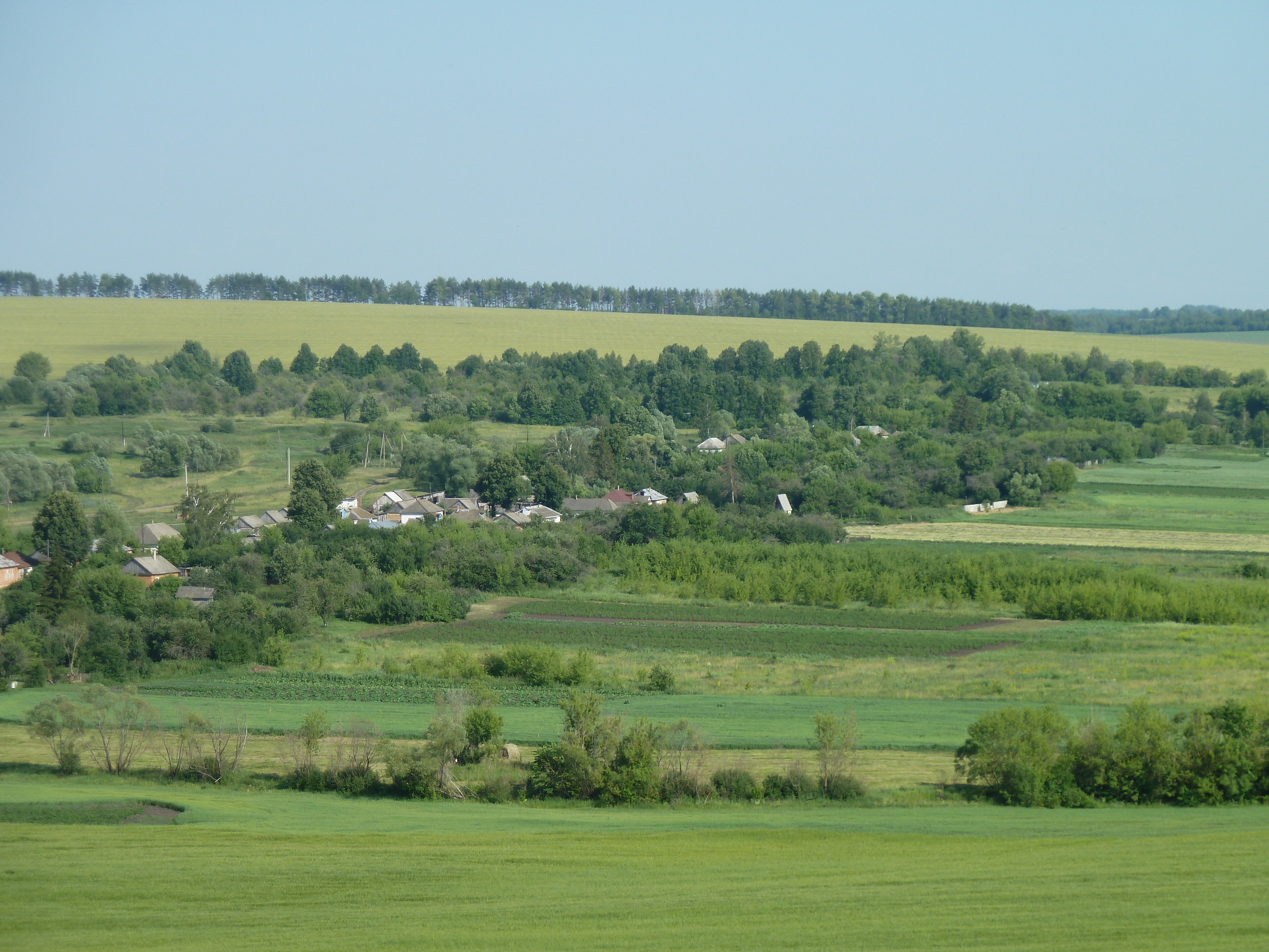 Вид на Горенку с правого берега Зуши (пр.)